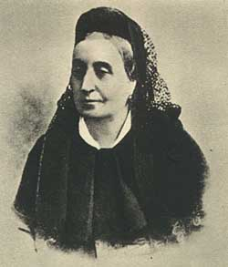 Giuseppina Strepponi (1815–1897), italienische Opernsängerin und zweite Ehefrau von Giuseppe Verdi.